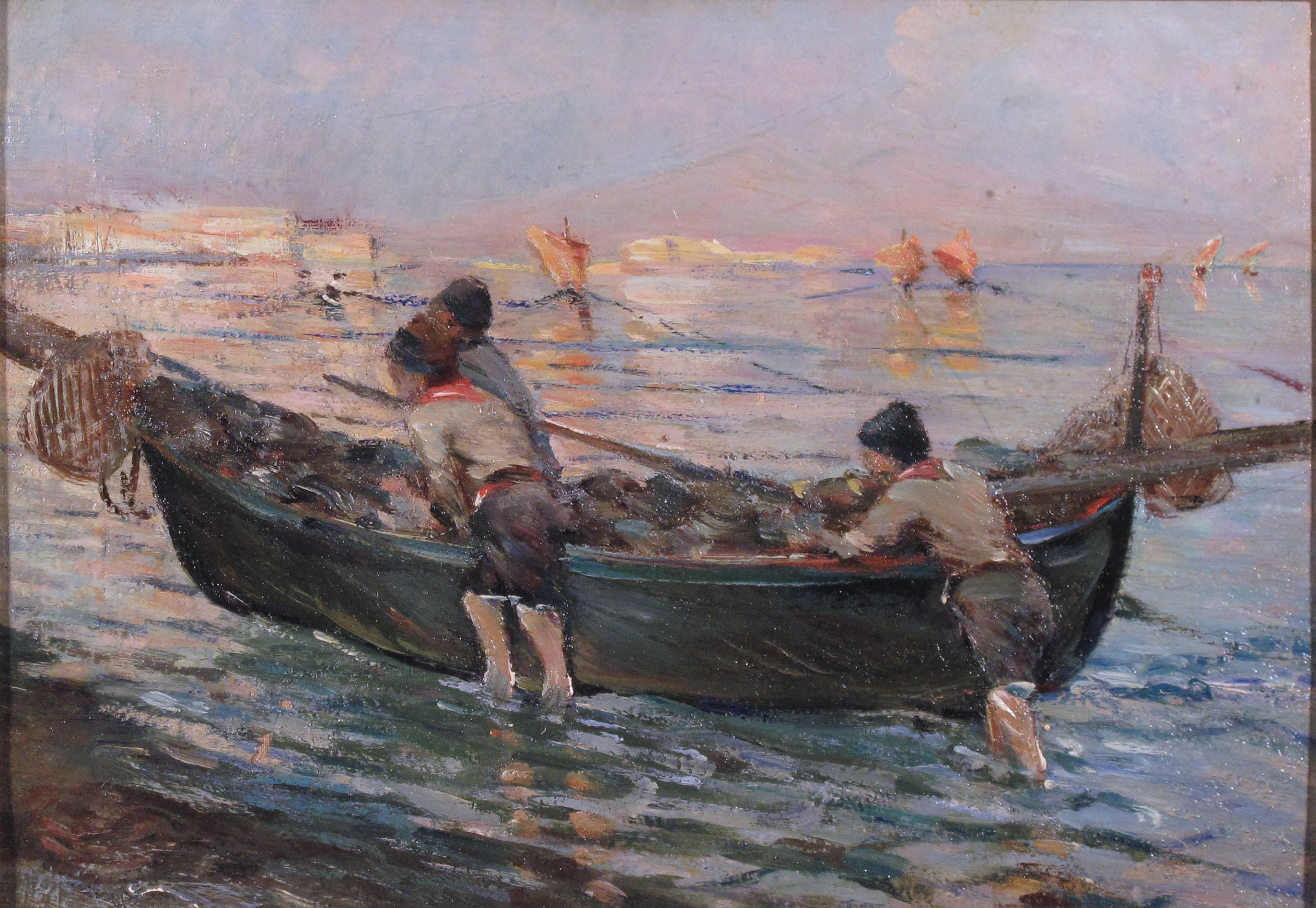 olio su tavola, dimensioni 45x30 - (Lucca, collezione Lorenzo Pacini)